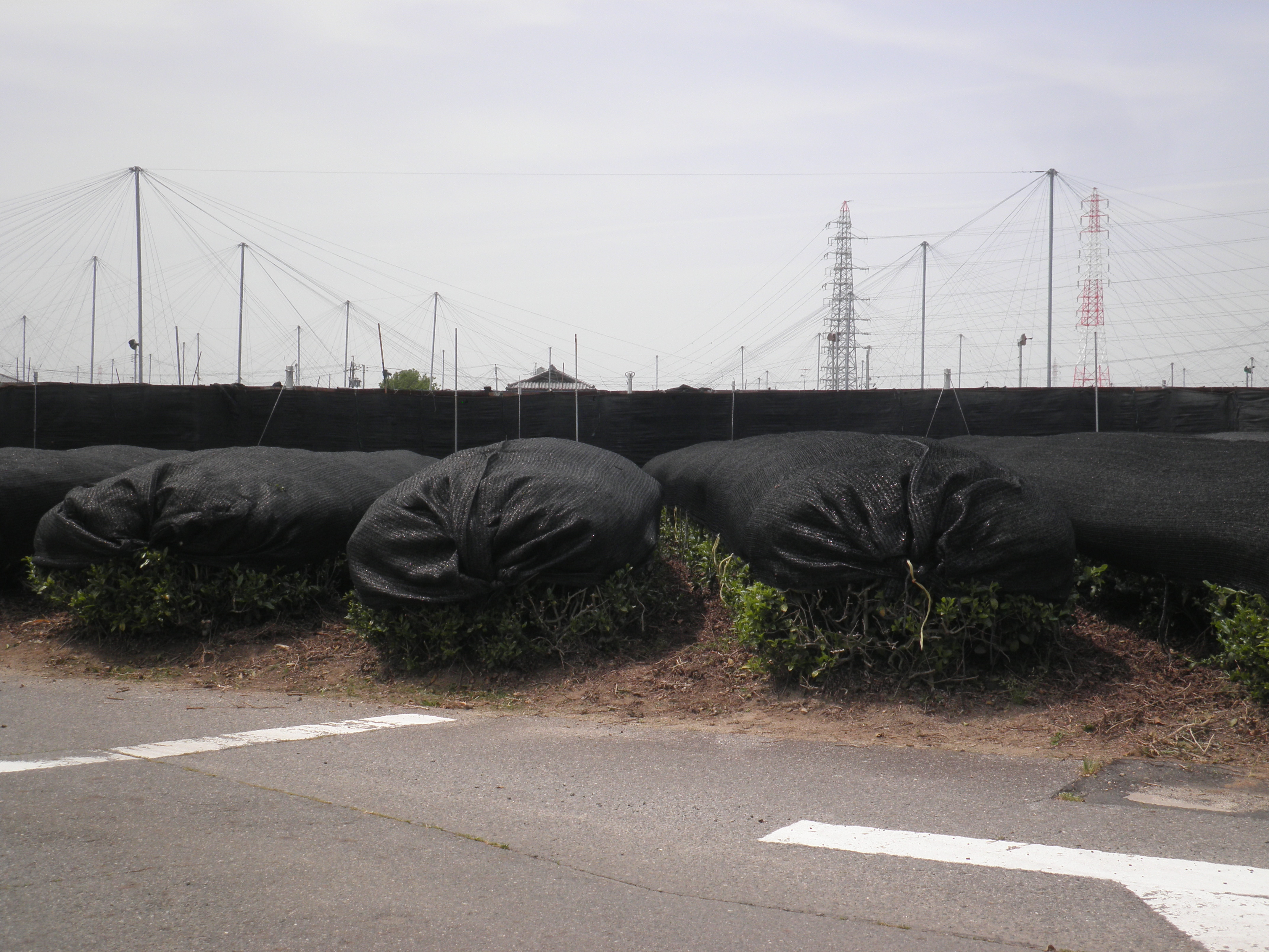 愛知県西尾市の茶園。碾茶を生産するために黒いネットで被覆している。